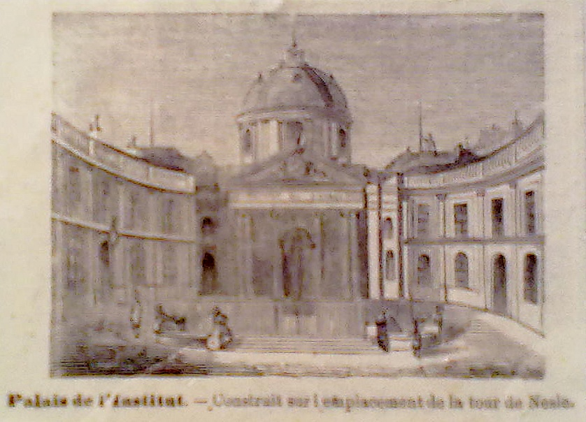 Fontaine de l'Institut (détruite), quai de Conti (Paris, 6e arrond) - Gravure de petite taille dans un journal du début du XIXe siècle. Anonyme.